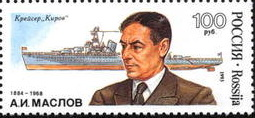 Почтовая марка России - А. И. Маслов, кораблестроитель